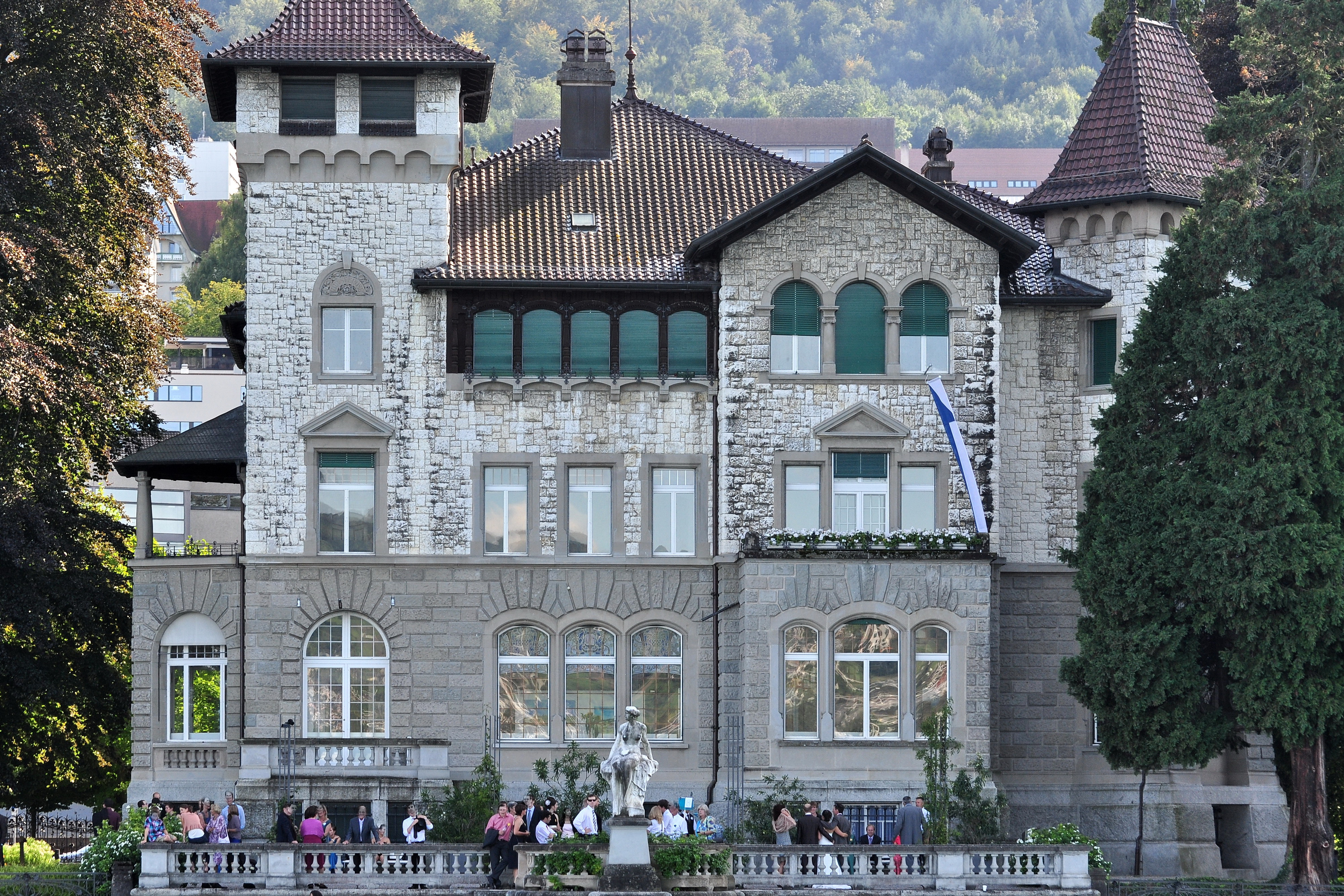 Seepavillon Herner in Horgen (Switzerland) as seen from ZSG paddle steamship Stadt Rapperswil on Zürichsee